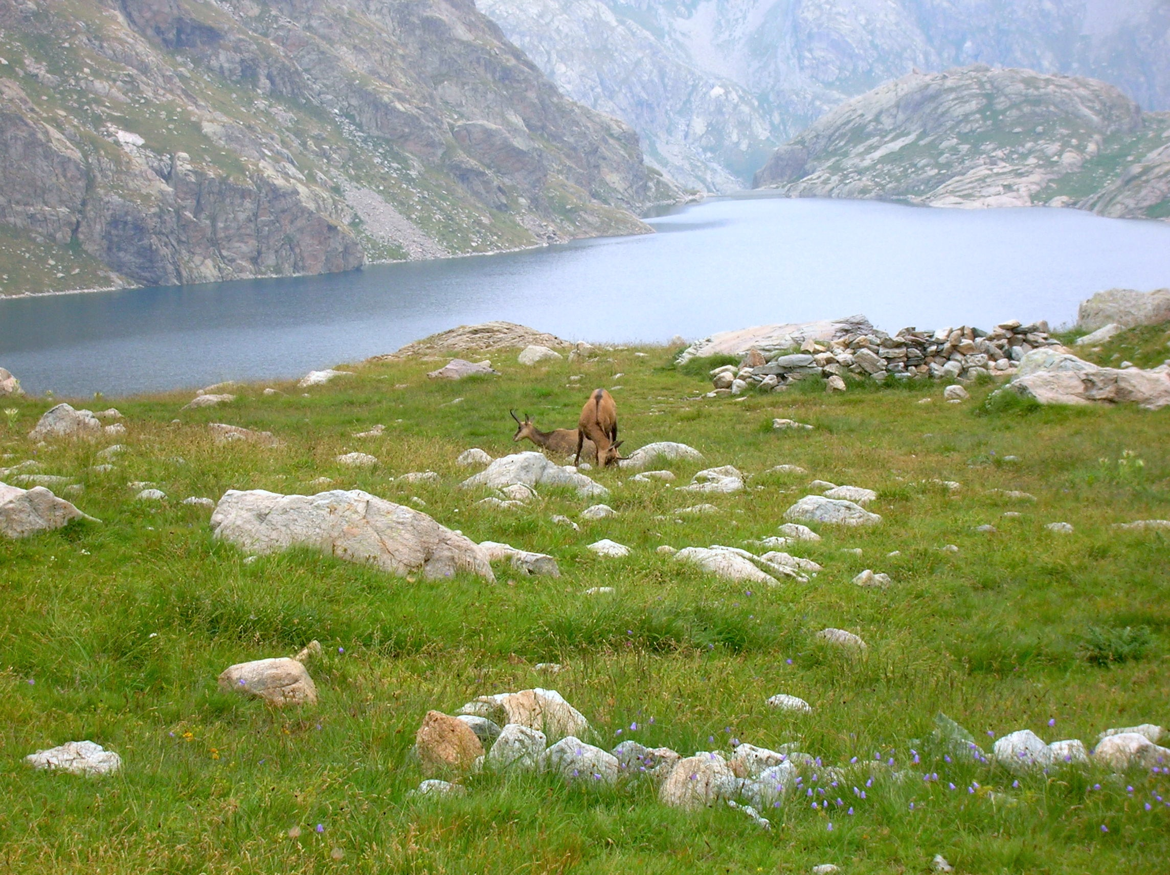 vallon de Valmasque. Tende, Alpes-Maritimes, Provence-Alpes-Côte d'Azur, France.